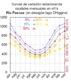 Curvas de variación estacional del río Pascua en el desagüe del Lago O'Higgins. # Universidad de Chile # Pronóstico de caudales medios mensuales en las cuencas de los río Baker y Pascua # Memoria de Pilar Andrea Barría Sandoval # 2010 # url= # Río Pascua en el desague del O'Higgins, pág. 23 mes 5% 15% 50% 85% 95% abr 1062 943 834 764 635 may 876 846 758 663 575 jun 776 703 613 540 466 jul 633 592 503 441 382 ago 559 484 431 374 343 sep 482 426 385 341 320 oct 492 430 381 341 319 nov 544 497 439 377 355 dic 712 622 547 476 430 ene 906 850 680 573 466 feb 1025 953 837 706 511 mar 1064 992 902 765 570